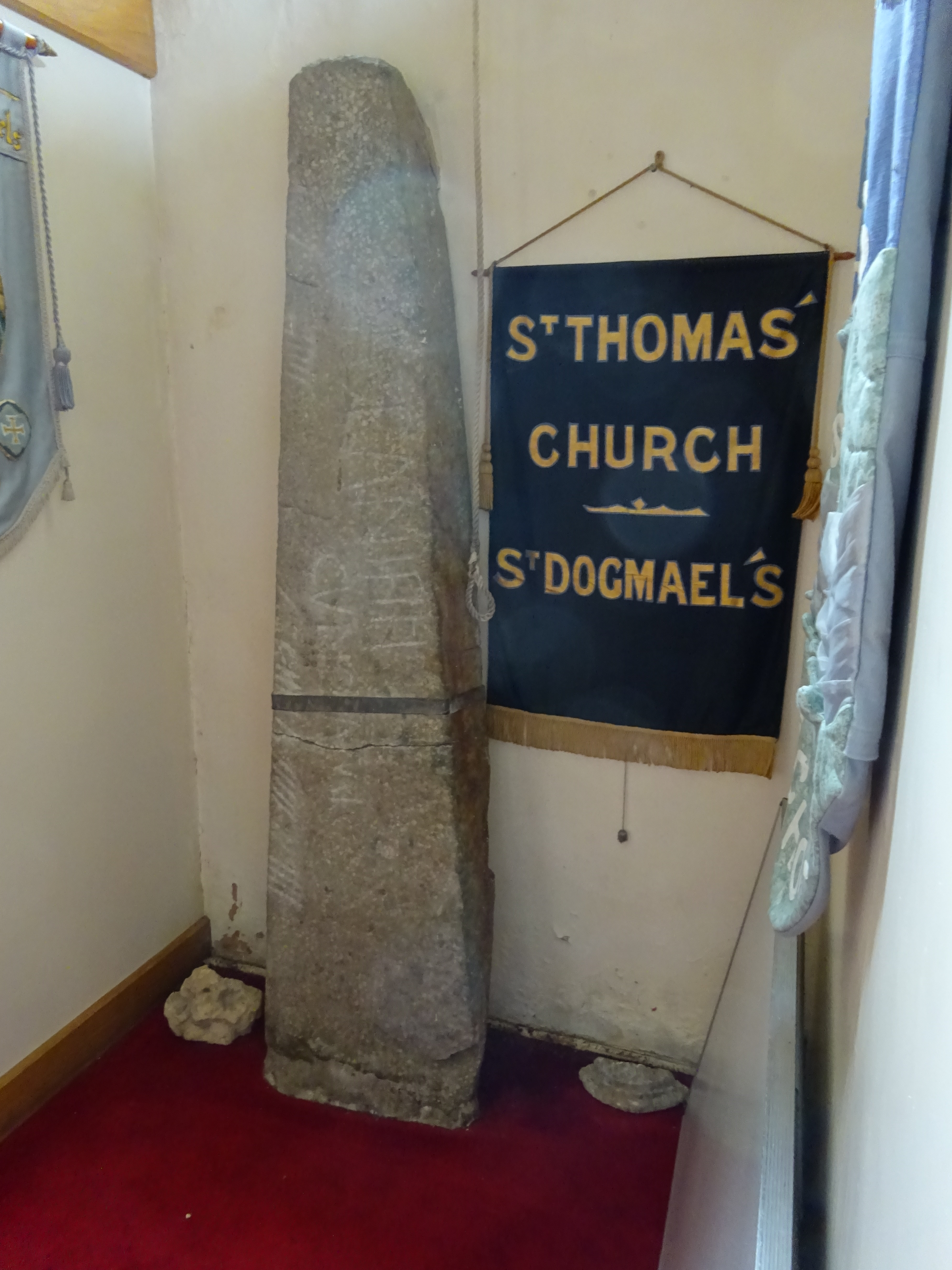 Eglwys Sant Tomos, Llandudoch. Yn yr eglwys, y drws nesaf i'r abaty, mae Carreg Sagranus, sydd wedi bod yn bwysig iawn i ysgolheigion fel allwedd i fedru dehongli arysgrifau Ogam. Mae'r arysgrif Ladin arni yn coffáu Sagarani fili Cunotami, ac mewn Ogam Sagrani maqi Cunatami (Sagranus fab Cunotamus).